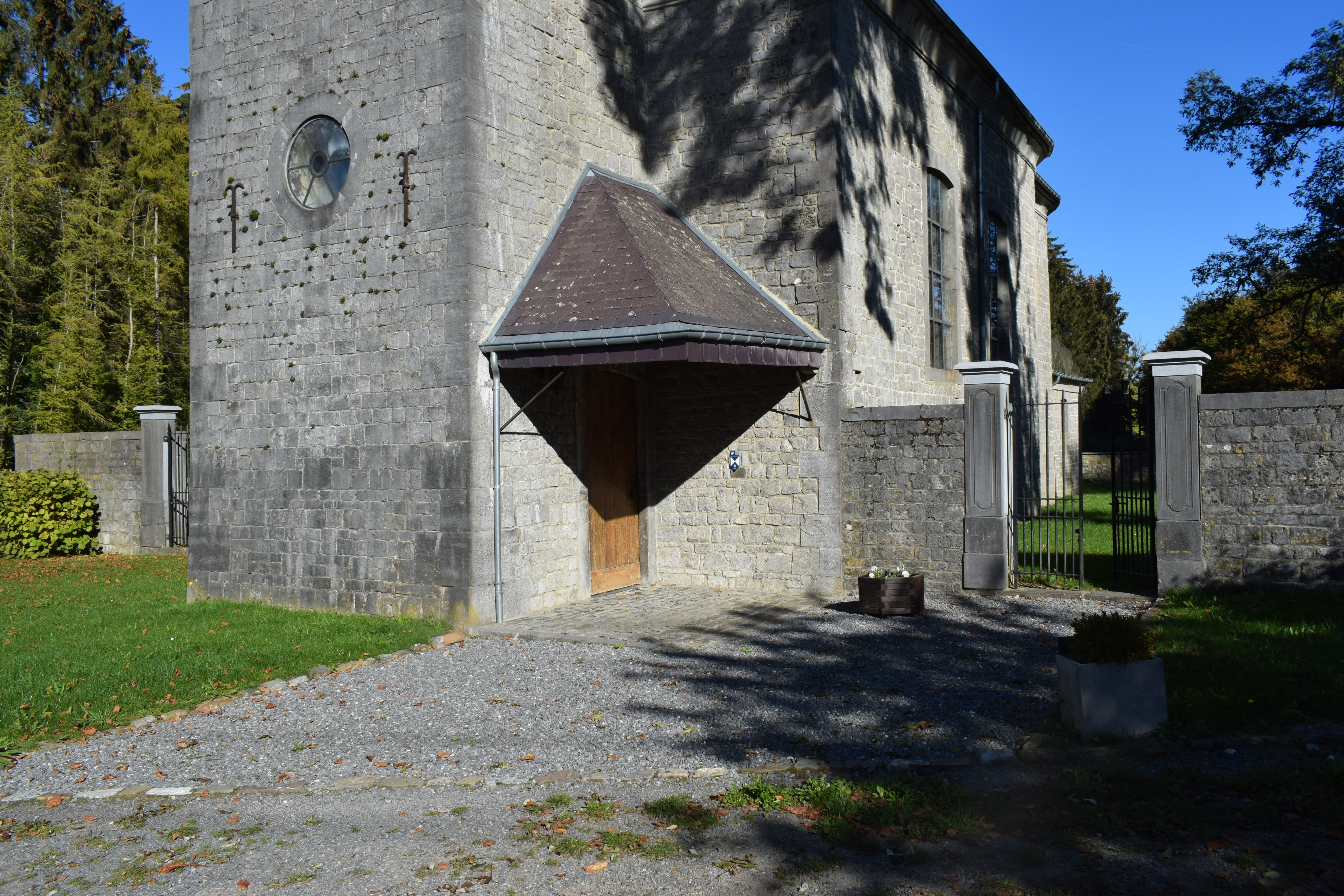 Vue du village de Libois, dans la commune d'Ohey (région du Condroz en Belgique).